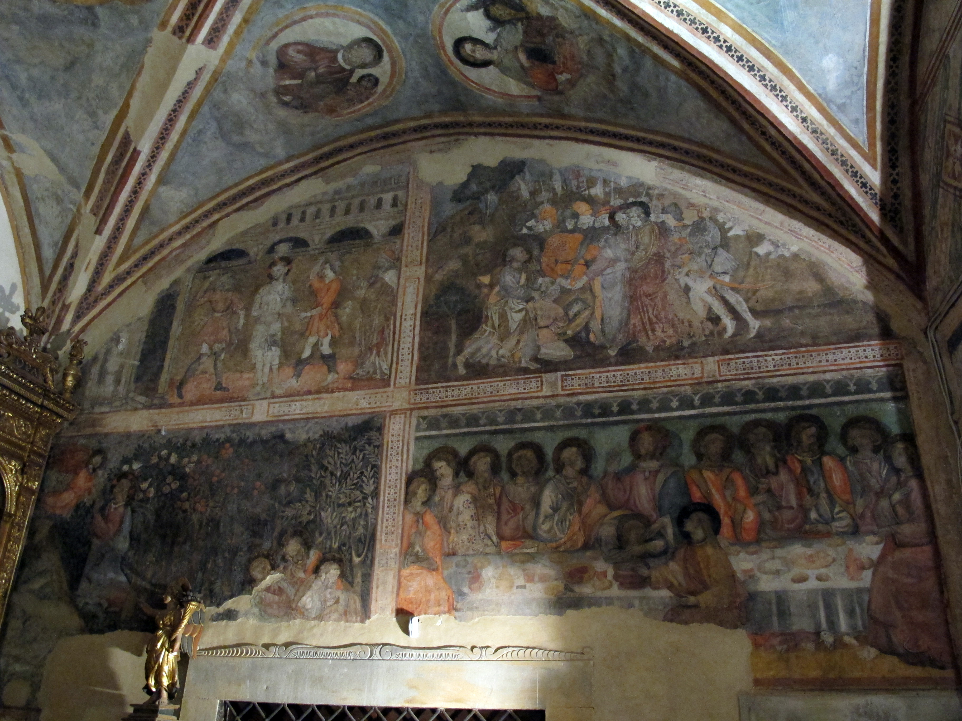 San Miniato